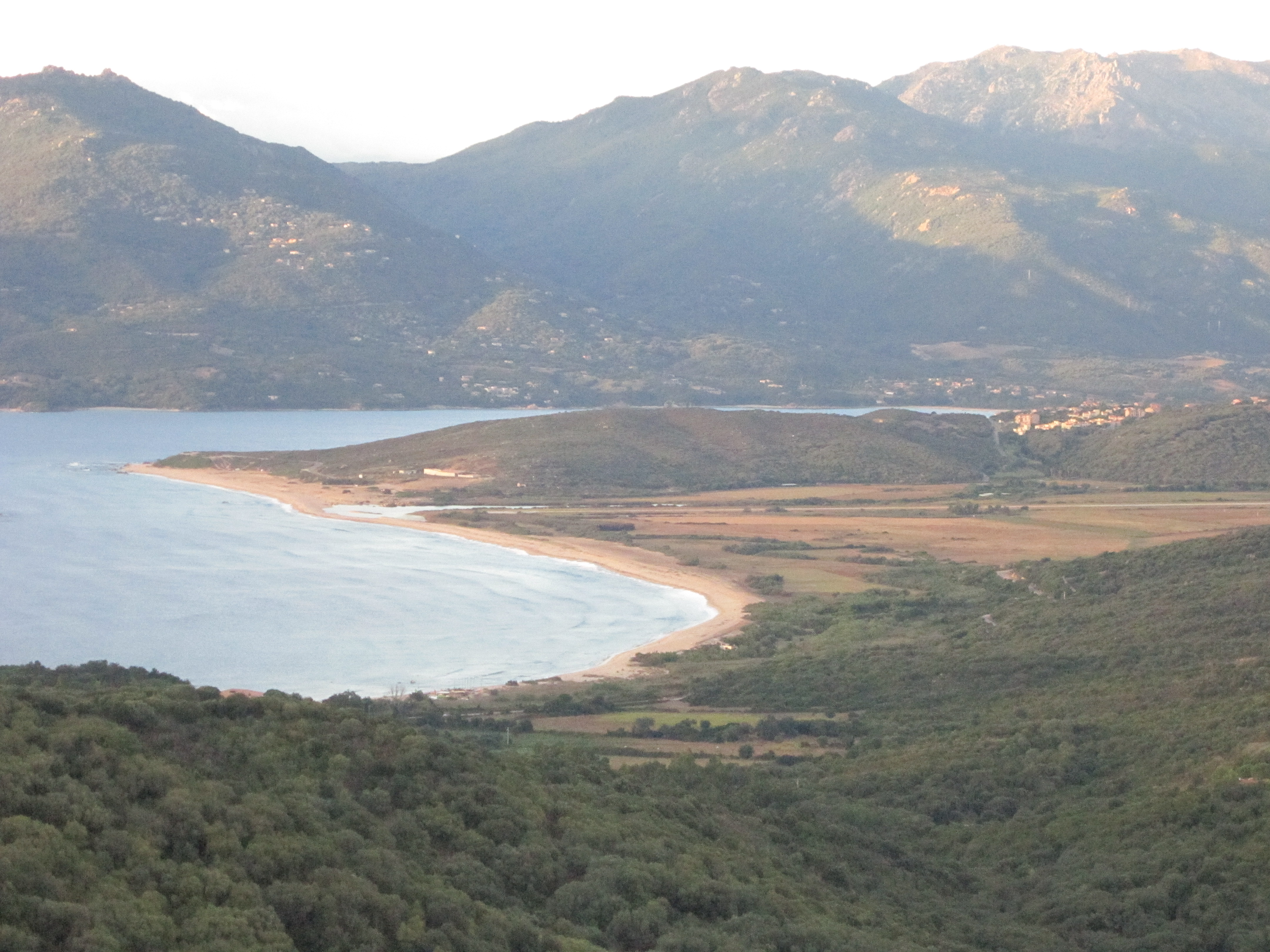 Embouchure du Rizzanese, Fleuve de Corse L'embouchure est au milieu de la grande plage, on peu voir également la piste de l'aérodrome de Propriano juste devant le fleuve